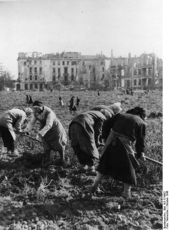 Berlin, Frauen bei Kartoffel-Ernte im Tiergarten Illus-Heinscher Die Nutzbarmachung des Tiergartengeländes zur Gemüse- und Kartoffelpflanzung hat sich rentiert. Die Tiergarten-Verwaltung hat bis zum heutigen Tag ca. 10.000 Zentner Kartoffeln geerntet. Am früheren Kämperplatz sind ca. 150 Frauen bei der Kartoffelernte beschäftigt. 313-46 ADN-ZB/Heinscher/ Westberlin 1946: Frauen bei der Kartoffelernte am früheren Kämperplatz (Bezirk Tiergarten). Vom Tiergartengelände wurden bis Oktober 10 000 Zentner Kartoffeln geerntet.